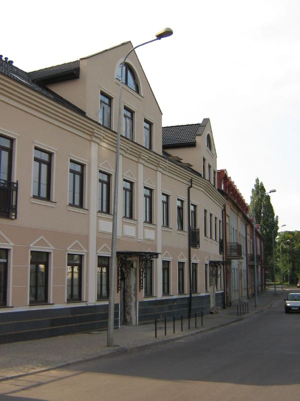 Białystok, ul. Włókiennicza 5